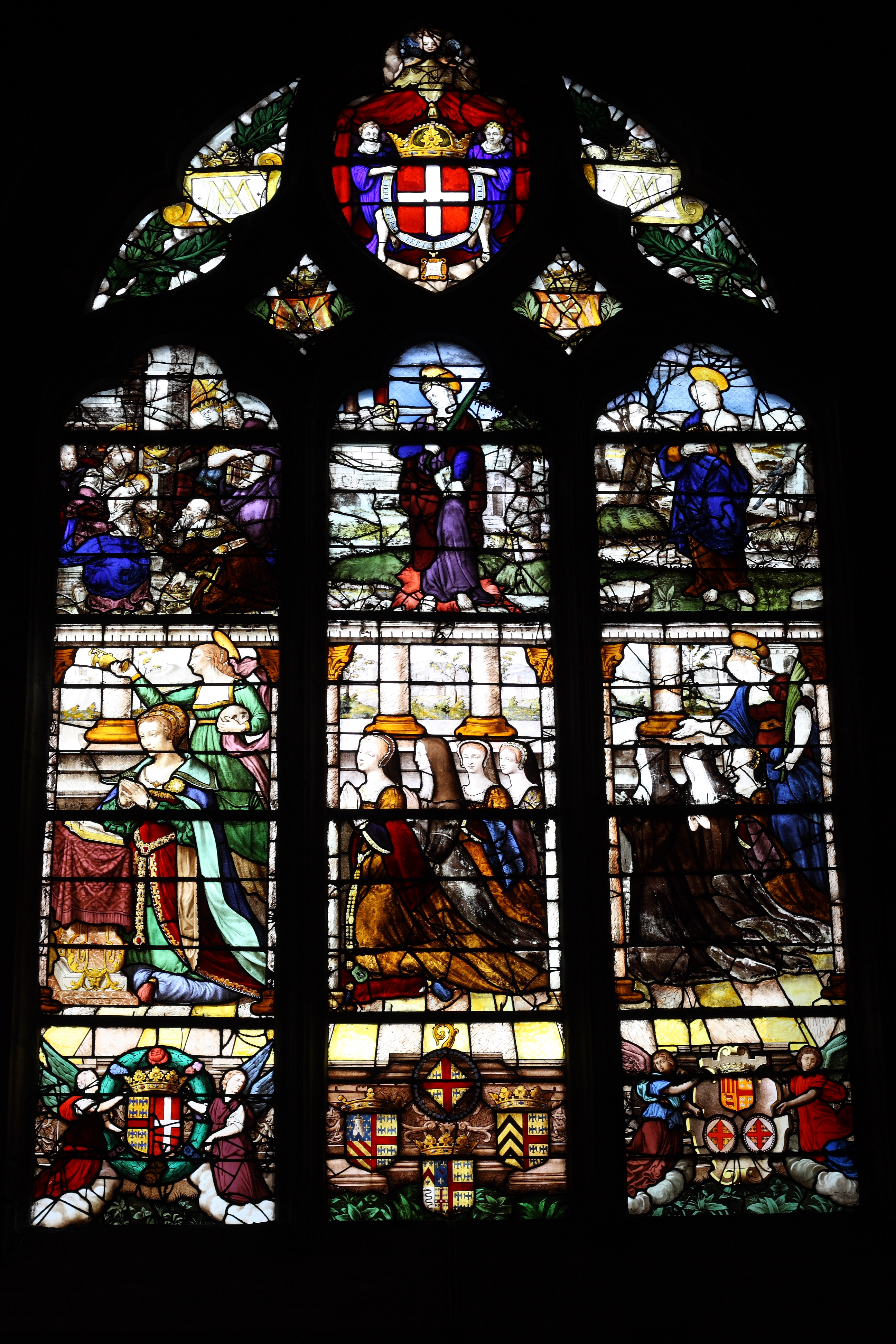 Bleiglasfenster Nr. 12 (mit Fragmenten aus dem 16. Jahrhundert) in der katholischen Pfarrkirche Saint-Martin (Collégiale Saint-Martin) in Montmorency, Darstellung: Madeleine de Savoie mit ihren sieben Töchtern, hl. Barbara und hl. Maria Magdalena mit Totenkopf, Karton: Charles Leprévost, Ausführung: François Emile Ehrmann (siehe: Dominique Foussard, Charles Huet, Mathieu Lours: Églises du Val-d'Oise. Pays de France, Vallée de Montmorency, Société d'Histoire et d'Archéologie de Gonesse et du Pays de France, 2. Auflage, Gonesse 2011, ISBN 9782953155426)